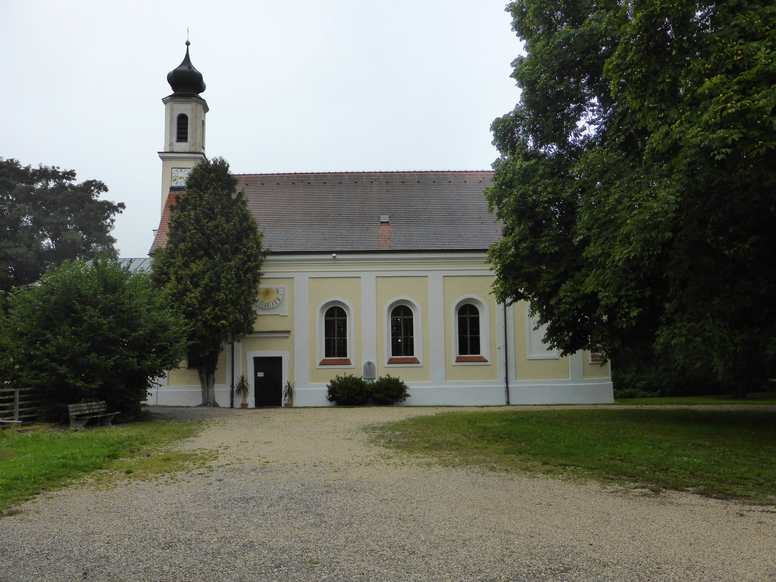 Schloss Baumgarten (Schlosskapelle)